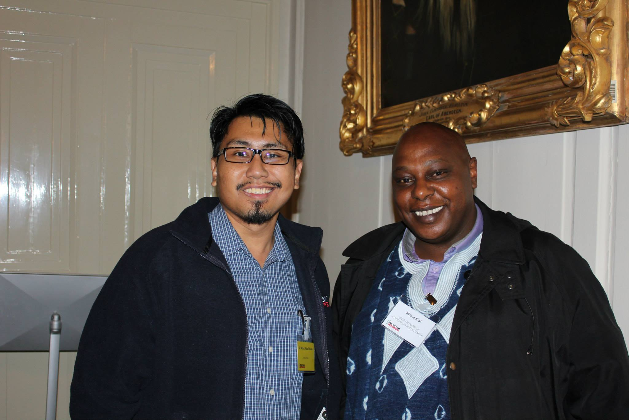 Dengan Maina Kiai